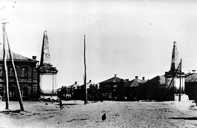 Застава